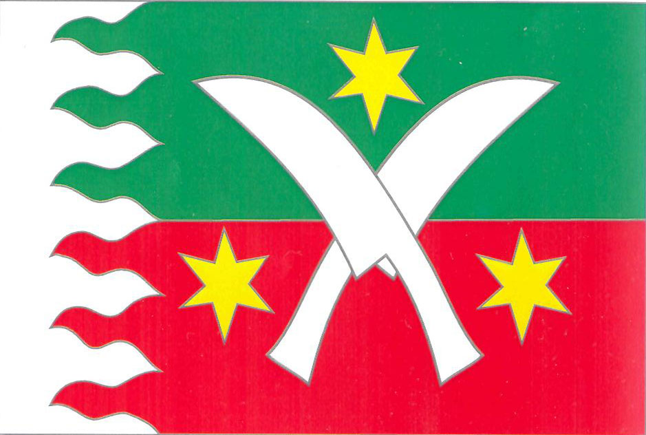 Vlajka obce Žďár v okrese Blansko